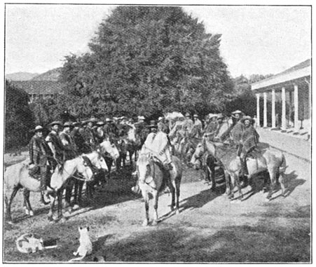 "Zondagsmorgenreunie der Hacienda-chefs" (Chili)